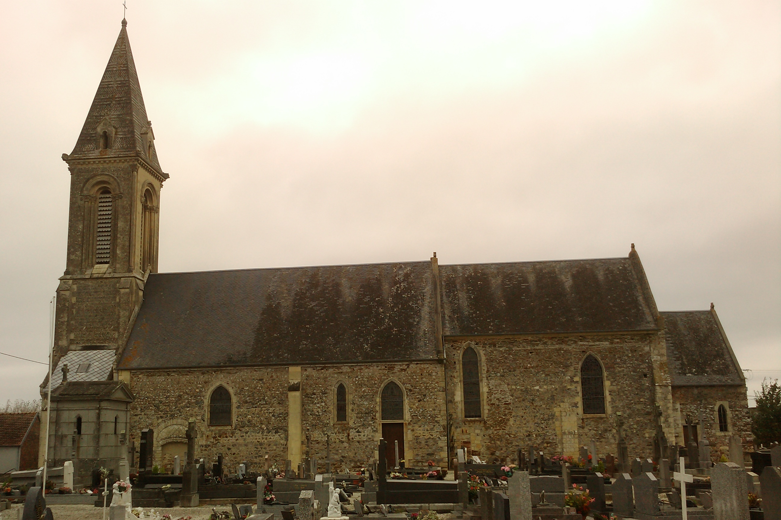 Église d'Airel